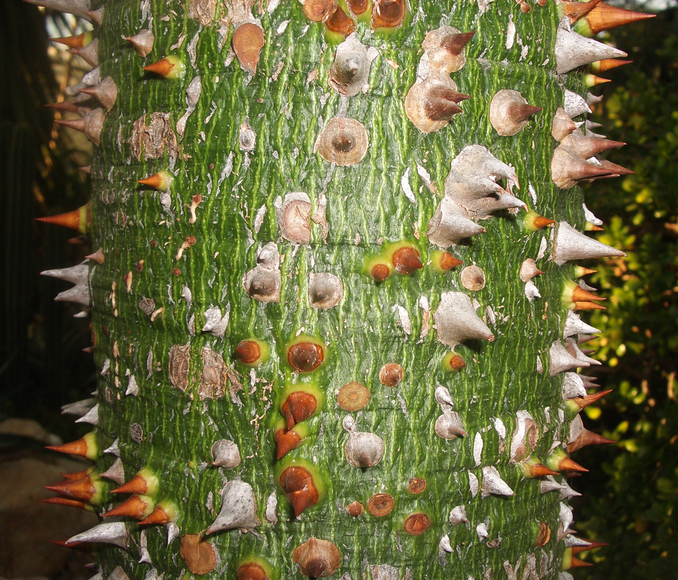 Ceiba speciosa (stem)